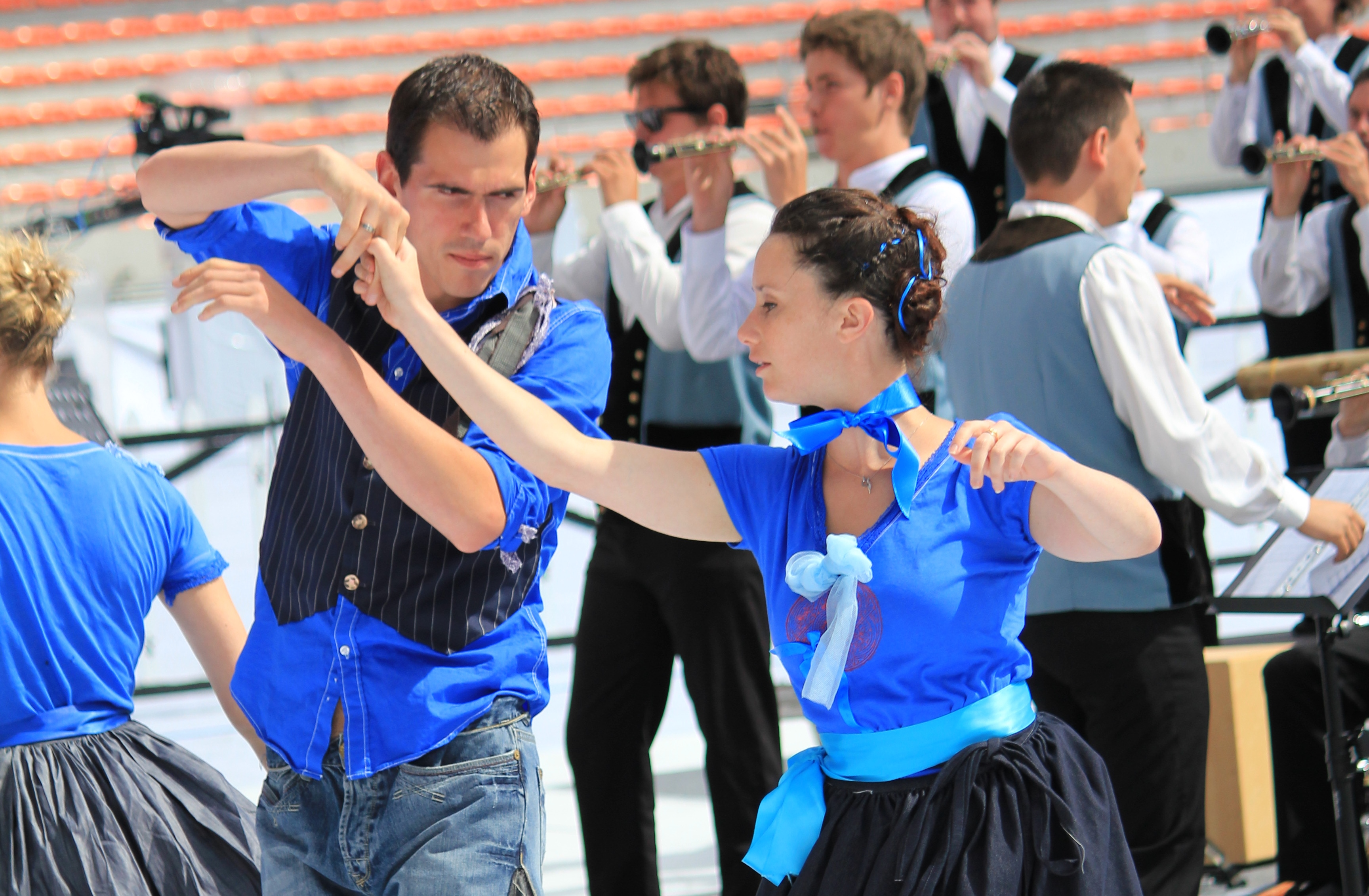 cercle celtique Festerion ar brug de Pluneret lors d'une collaboration avec le Bagad Melinerion de Vannes lors de l'épreuve de Lorient du championnat national des bagadoù organisée dans le cadre du festival interceltique de Lorient 2013.